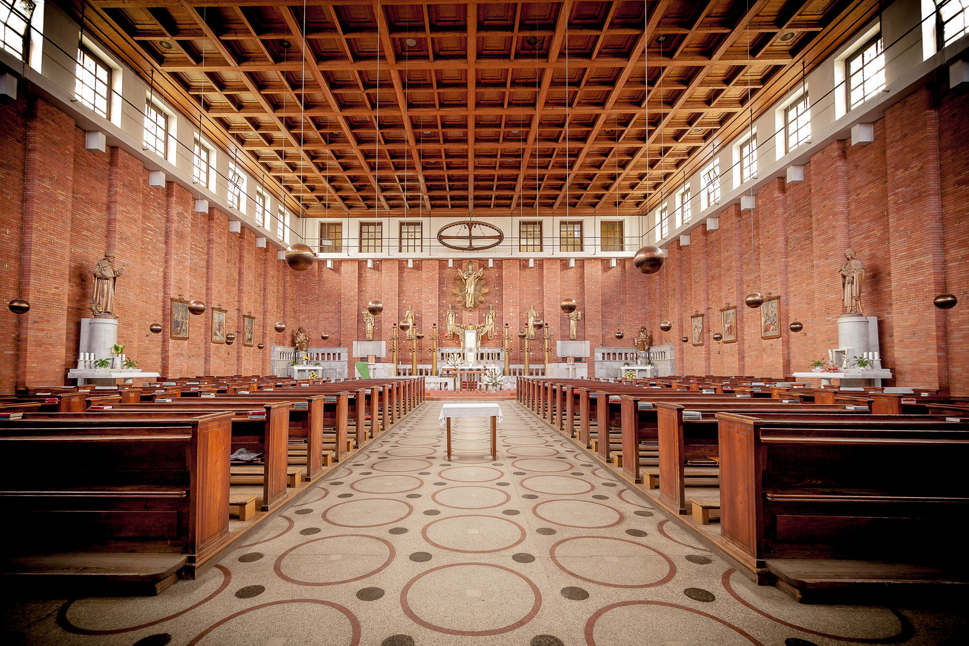 Pohled do hlavní chrámové lodě.